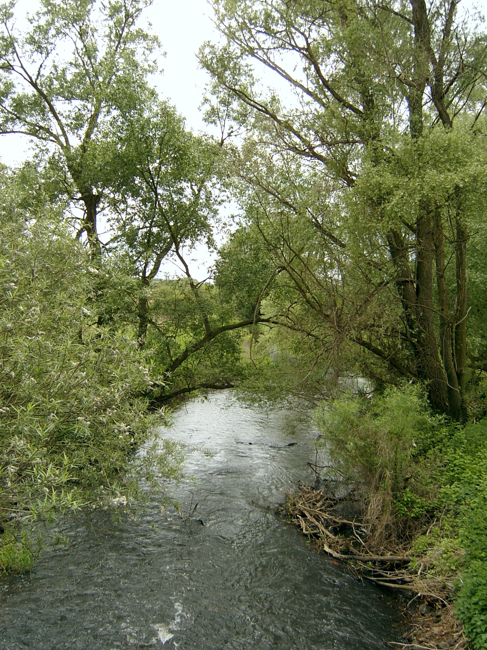 Die Eilang (Ilanka) bei Rybocice, Polen.